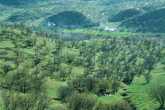 پارک جنگلی بلوران واقع در جاده کوهدشت به اسلام آباد- لرستان